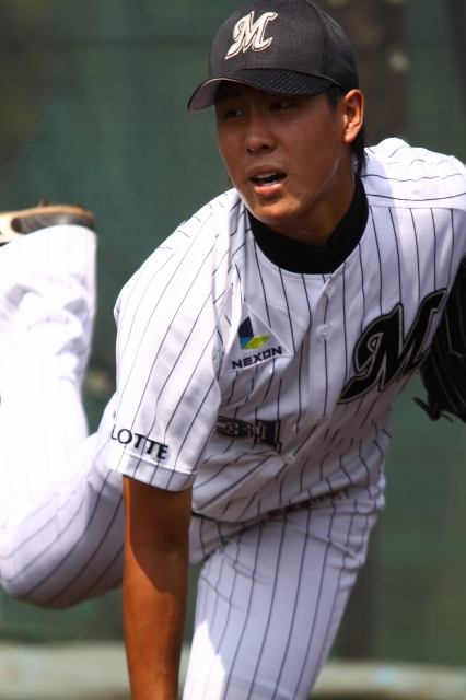 日本プロ野球 千葉ロッテマリーンズ 西野勇士 投手